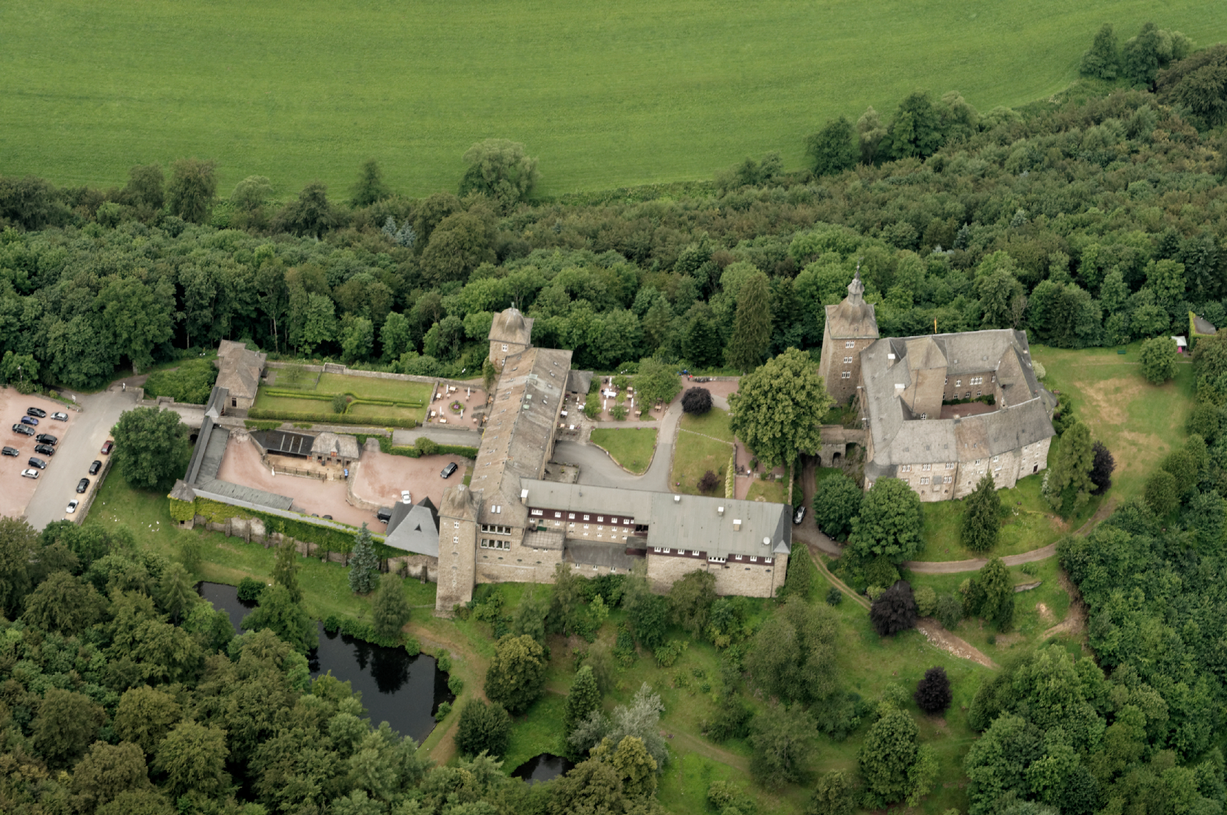 Fotoflug Sauerland-Nord. Attendorn, Burg Schnellenberg. The making of this document was supported by the Community-Budget of Wikimedia Germany.